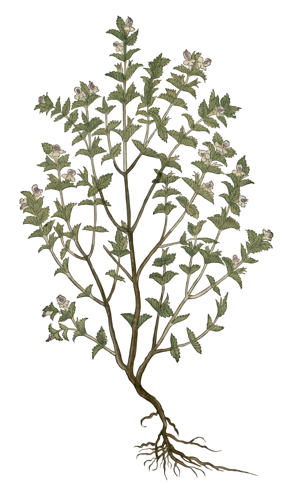 Euphrasia